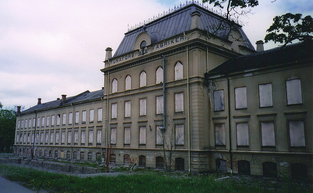 Foto 2007